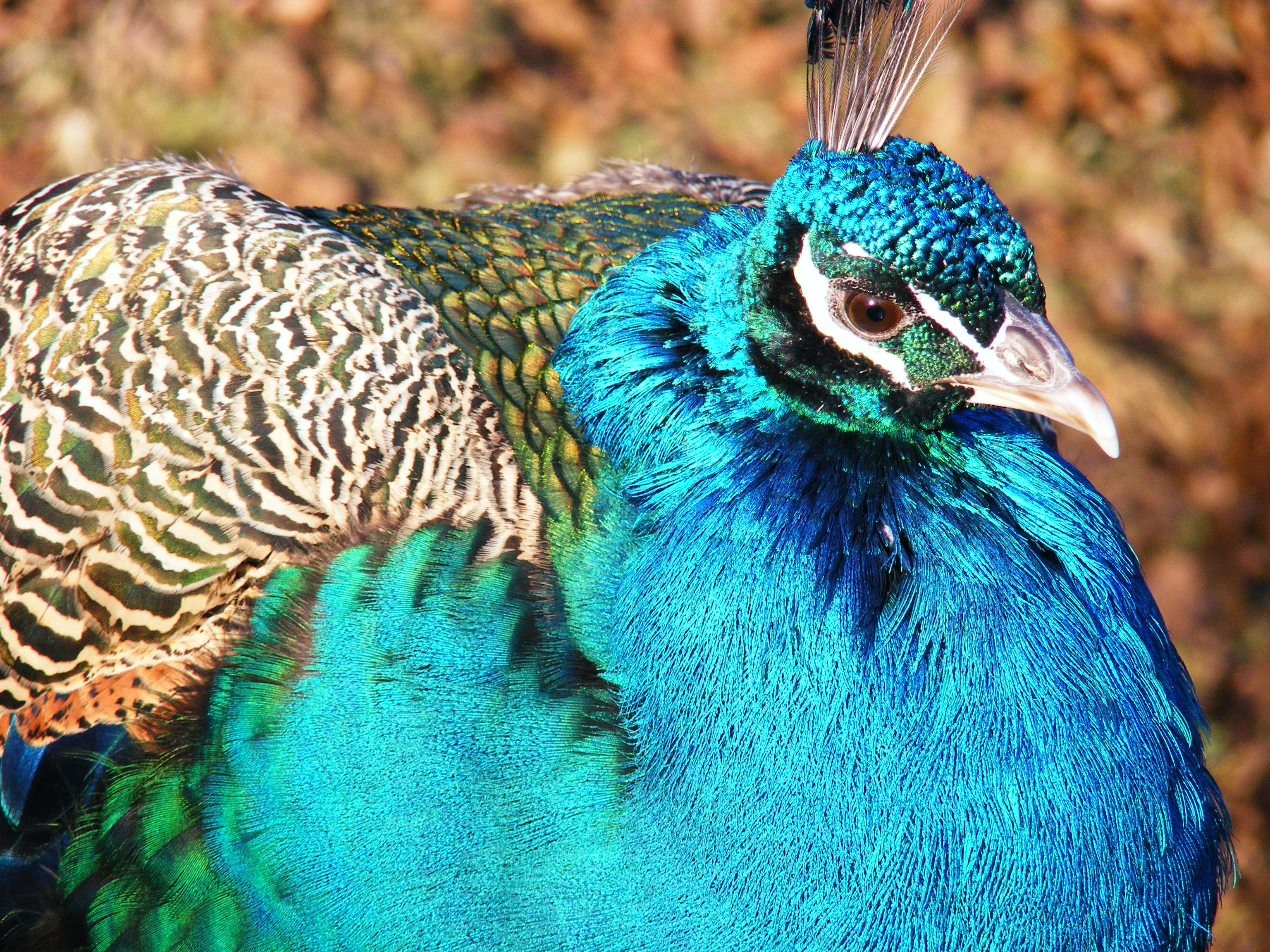 Blauer Pfau (Pavo cristatus), Nahaufnahme